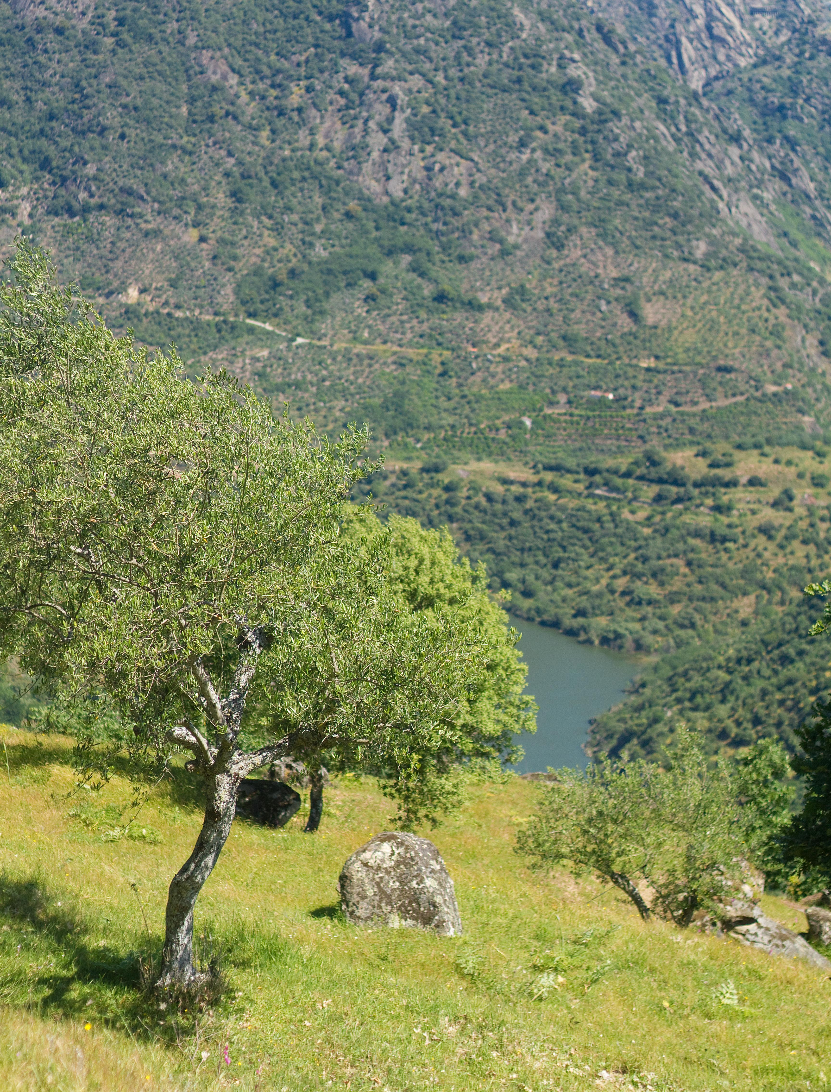 Un olivo cerca del mirador del Colagón del Tío Paco en Mieza, Parque Natural de Arribes del Duero, España.